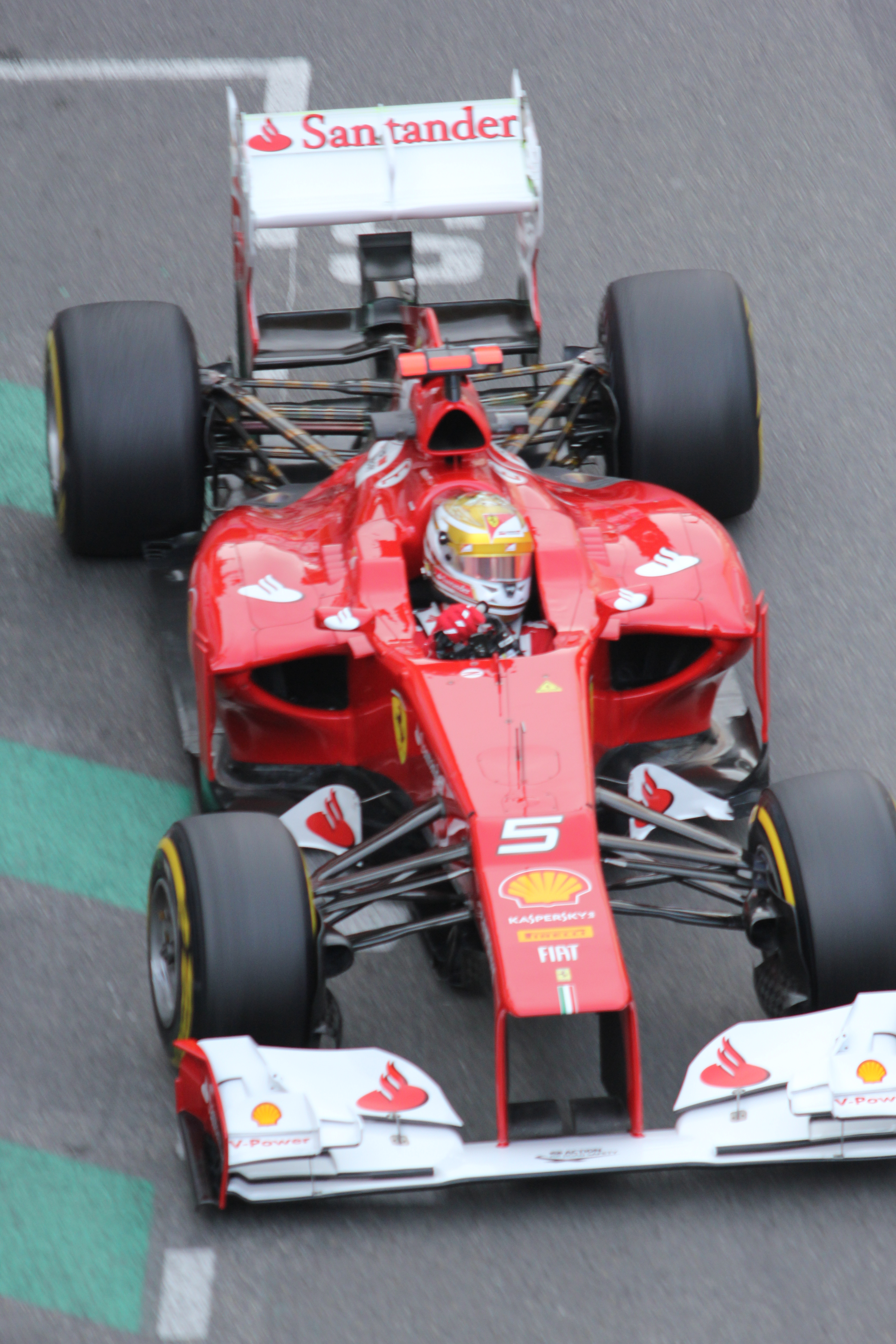 Ferrari F2012